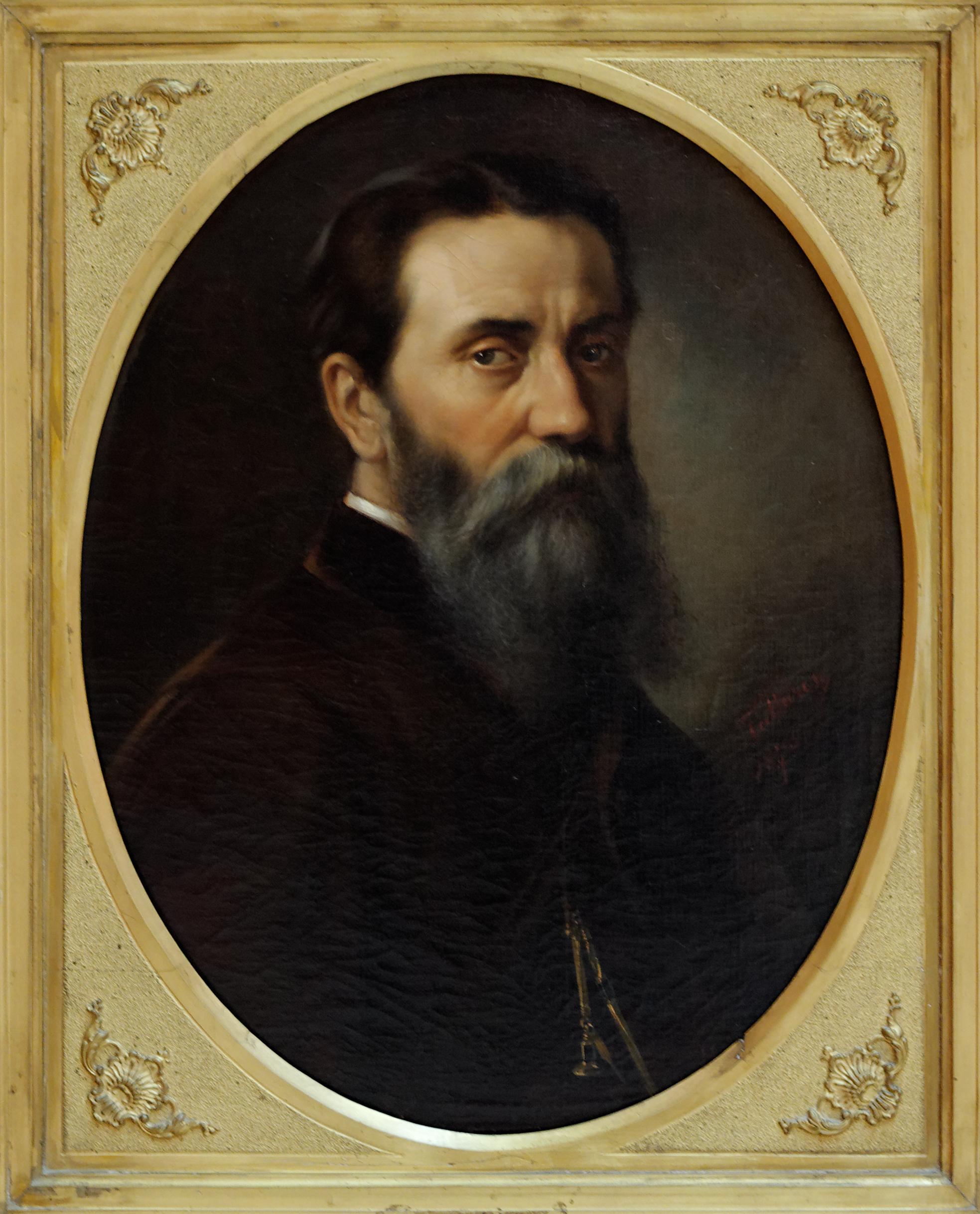 Autoportrait